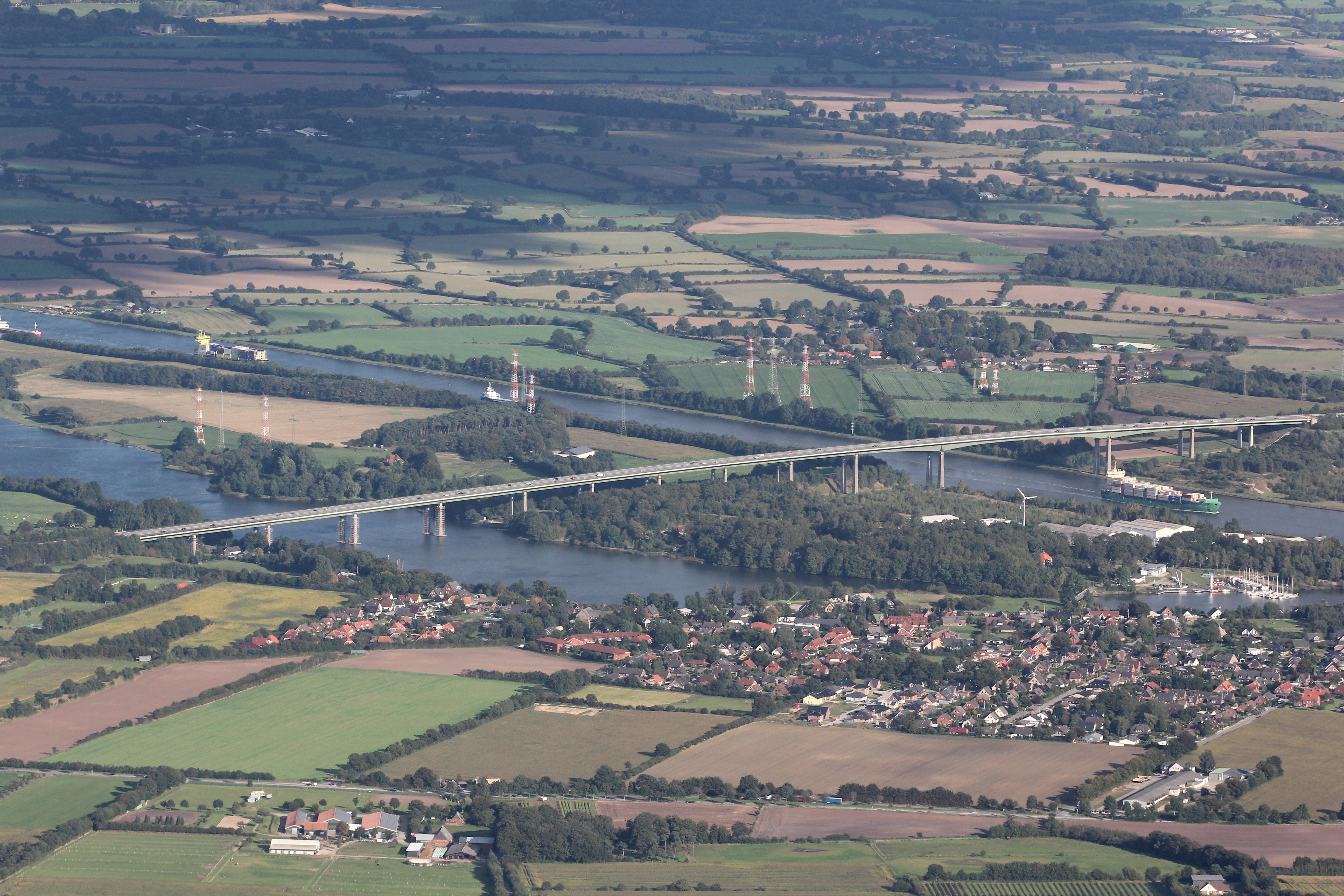 Luftbild, Blickrichtung Südost: Rader Insel und Rader Hochbrücke mit der Bundesautobahn 7.